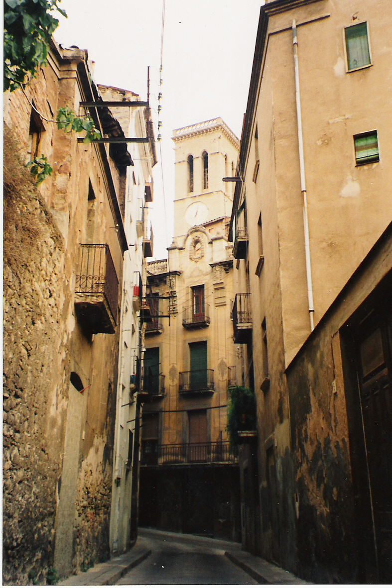 Manresa, Catalunya. Campanar de la Seu de Manresa vist des del carrer Na Bastardes